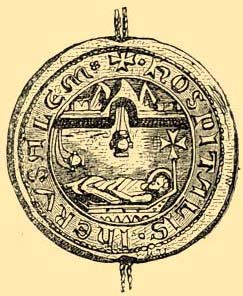 Szent János-vitézek rendjének pecsétje. A pecsétrajz a sírban fekvő Krisztust ábrázolja. Körirata: + HOSPITALIS • IHERVSALEM